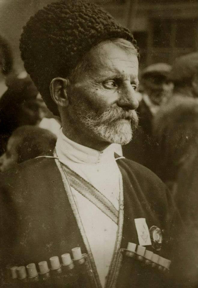 ლოტბარი